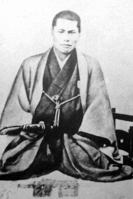 a Japanese man 近藤勇 (Kondō Isami)